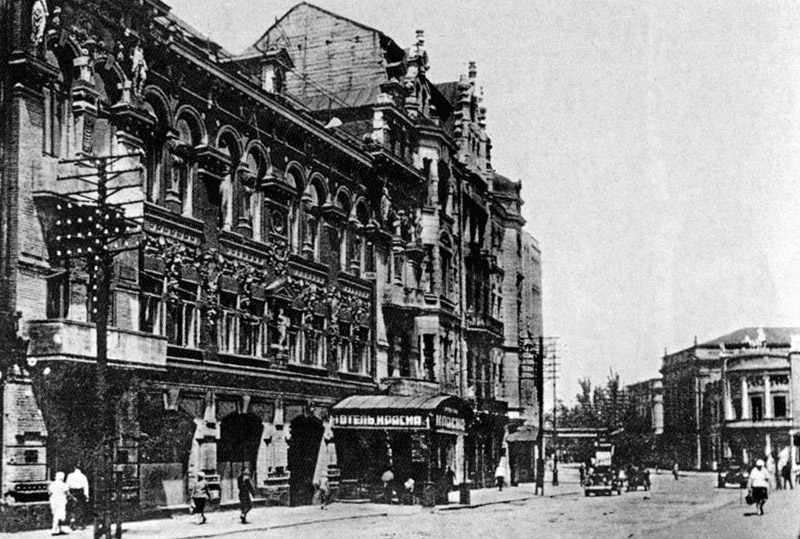 Клубна вулиця у Катеринославі.